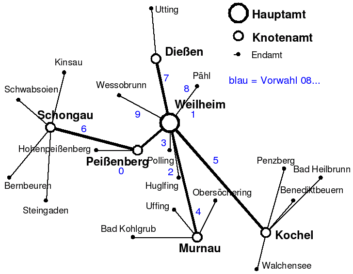 Netzstruktur des Telefon-Selbstwaehlfernnetzes in Weilheim nach dem Umbau auf offene Kennzahlen